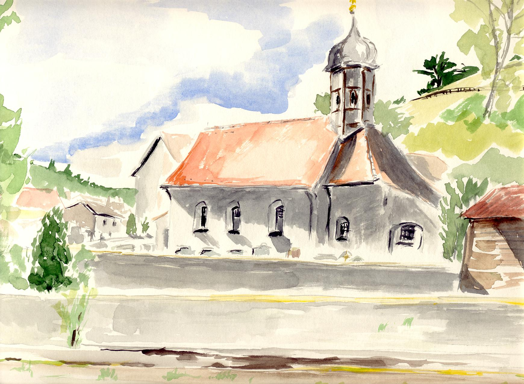 Kirch in Mühlheim im Gailachtal Landkreis Eichstätt. Aquarell von Siegfried Schieweck-Mauk